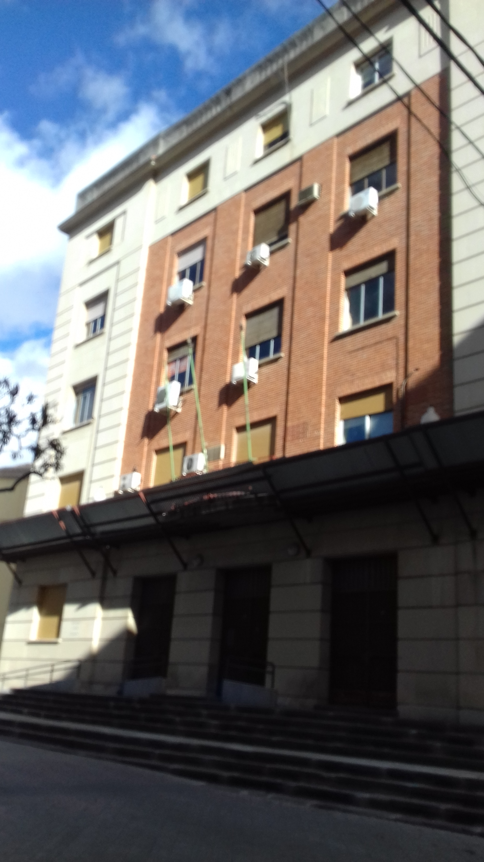 Casa Sindical de Albacete. Edificio Sindicatos. Albacete